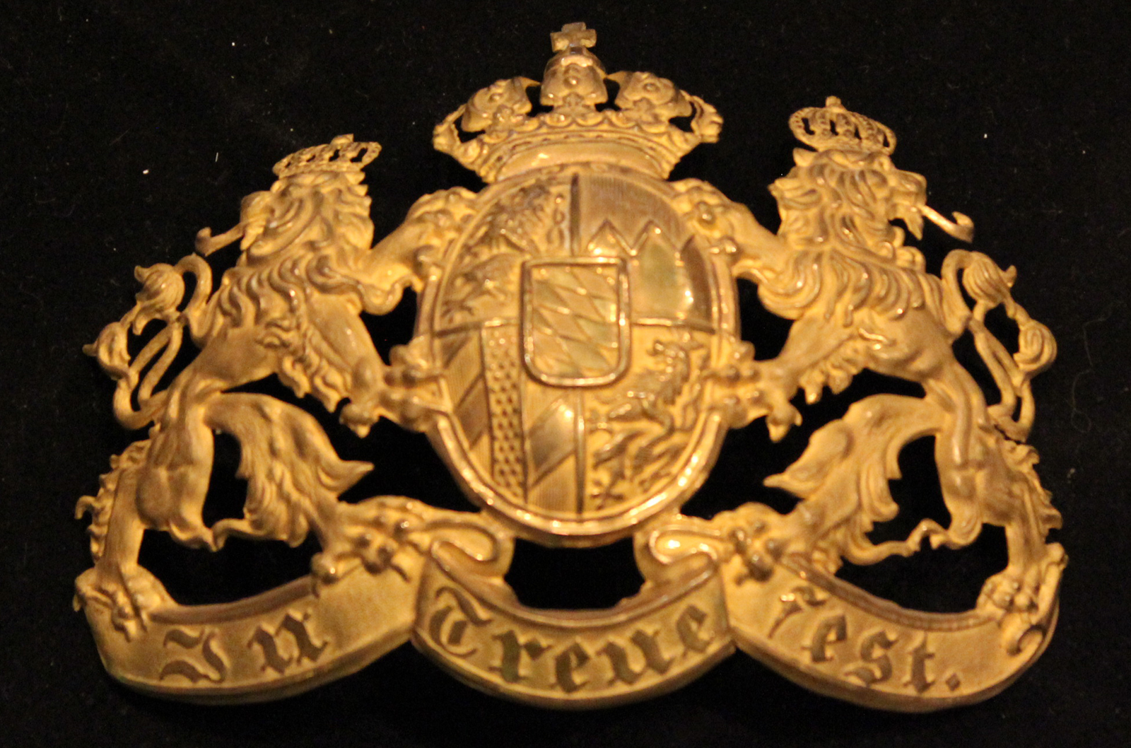 Original Helmschmuck, Kgl. Bayrisches 2. Infanterieregiment Kronprinz